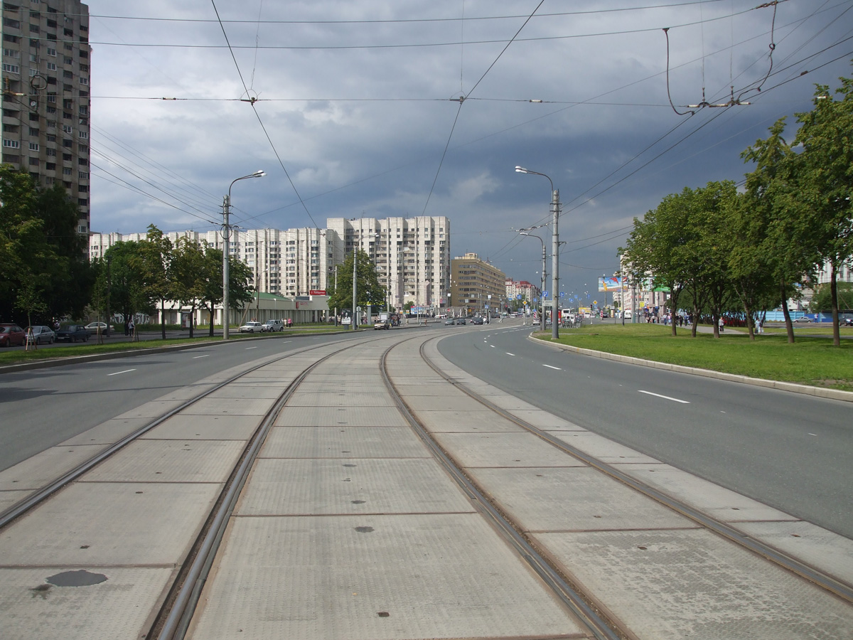 Наличная улица (Санкт-Петербург)